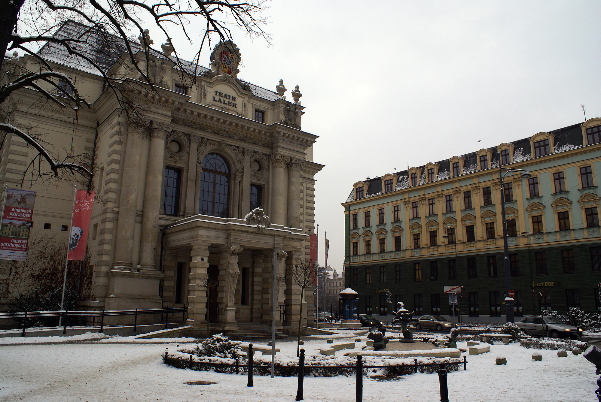 Wrocław, resursa kupiecka, 1892-1909